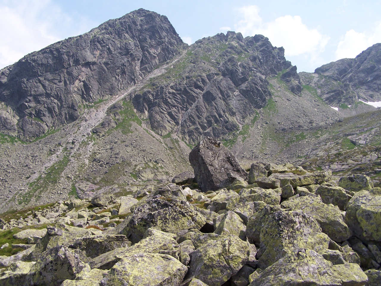 Kościelec (Tatra Mountains)